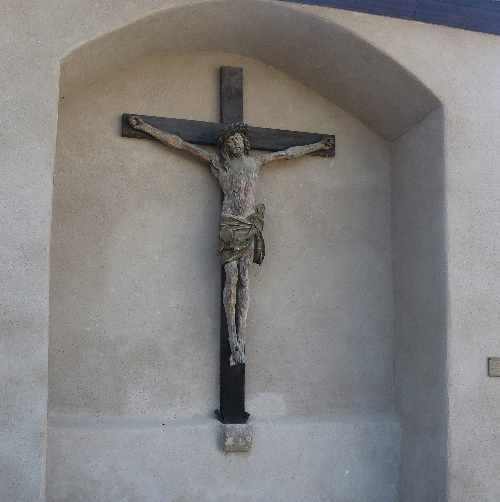 Christ en croix datant de 1508 attribué à Paul Windecker de Sélestat